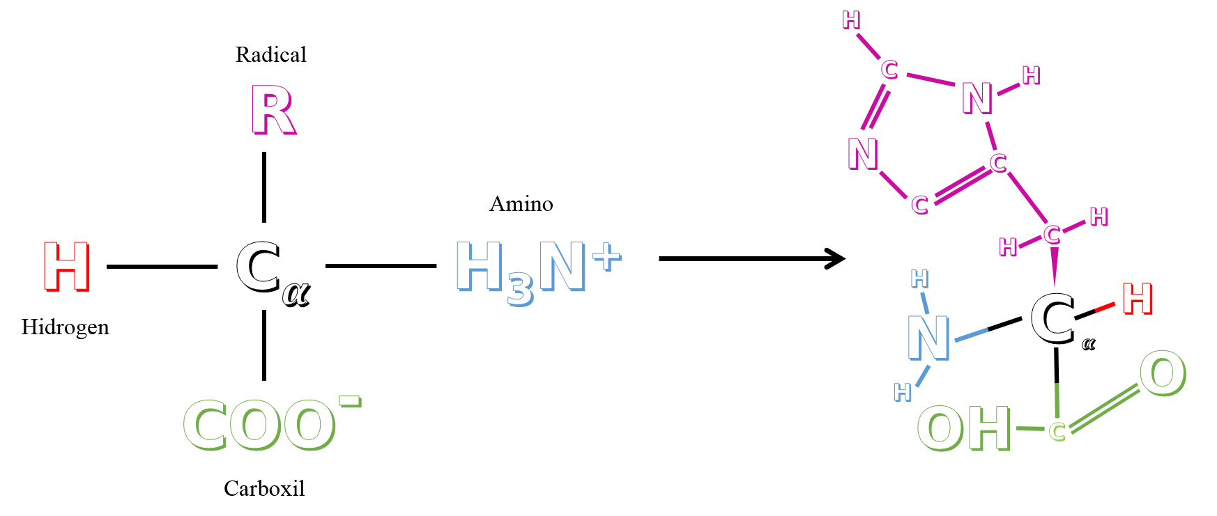 Estructura d'un aminoàcid genèric i estructura de la Histidina. Es veuen els components de forma esquemàtica.